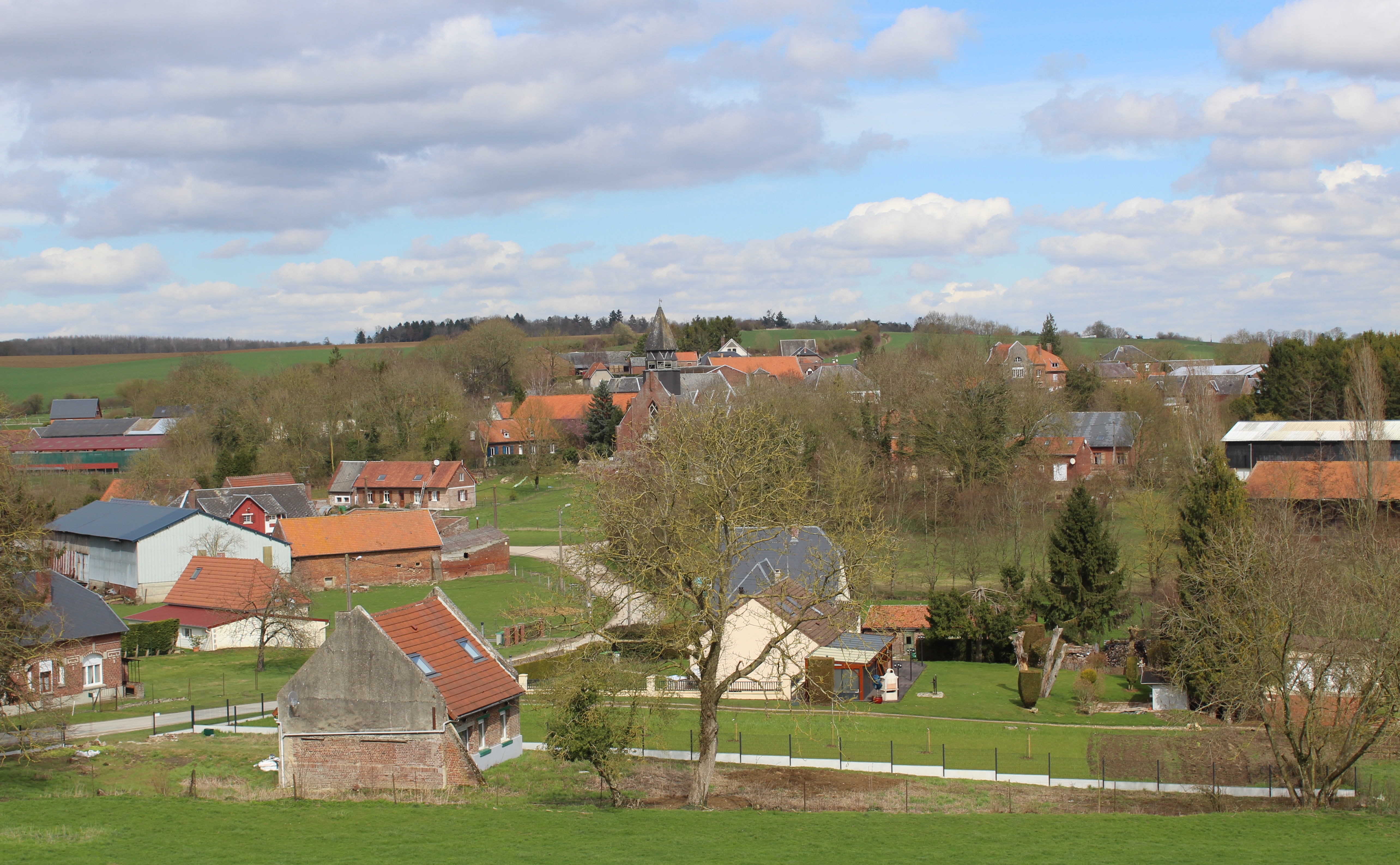 Panorama du village